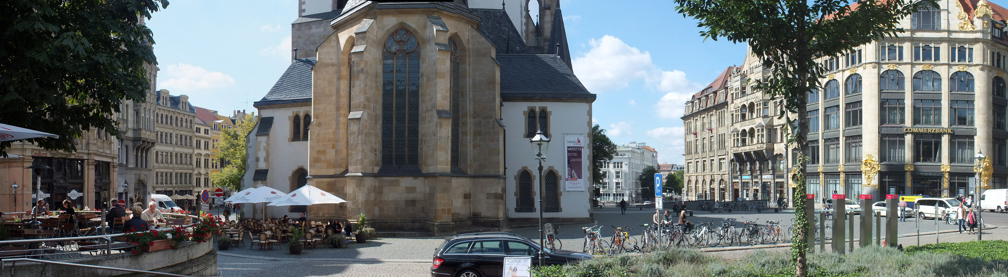 Thomaskirchhof Leipzig - Gesamtansicht von Osten